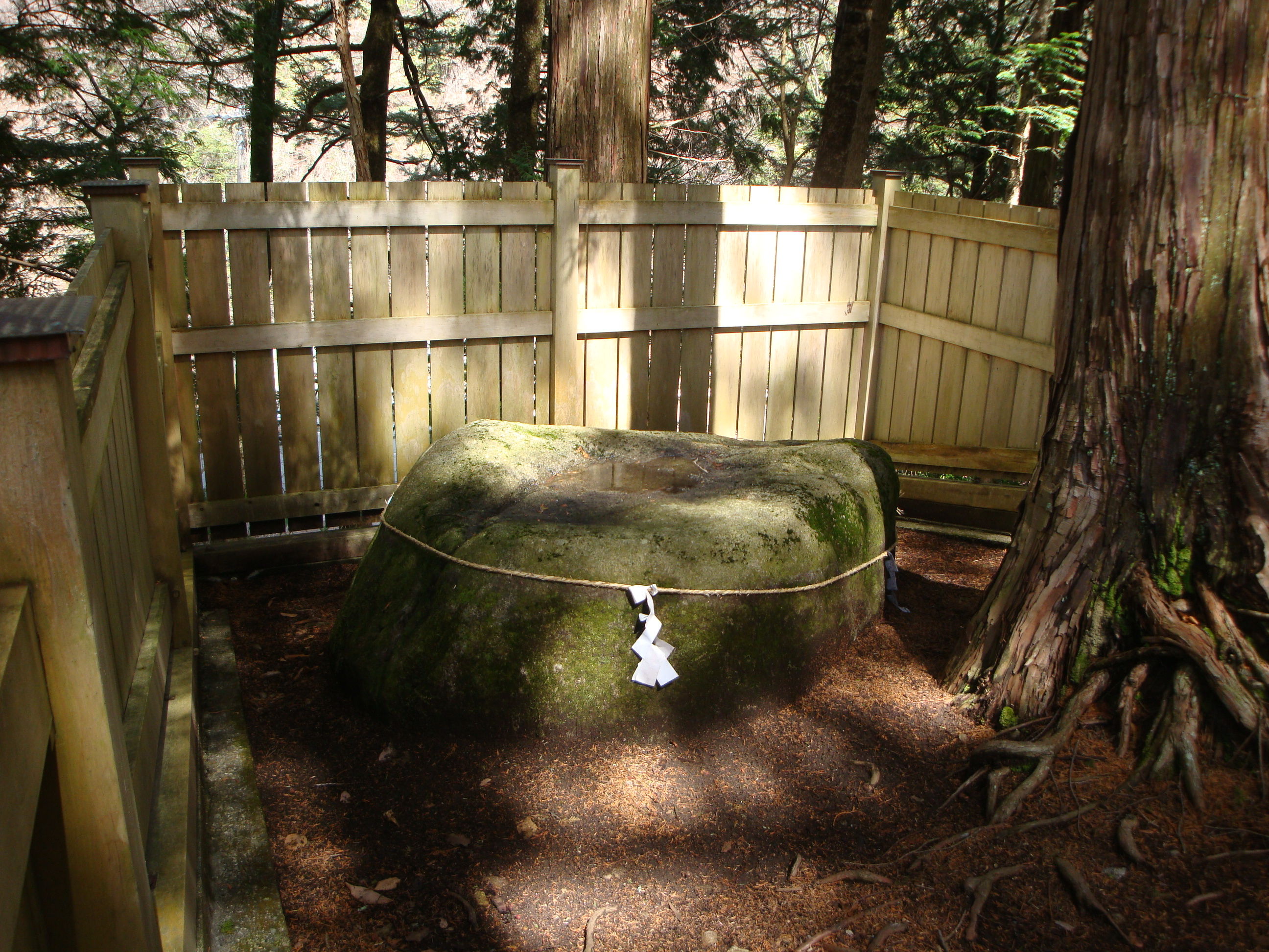 奥宮にある磐座 とがった部分が東西南北を表している